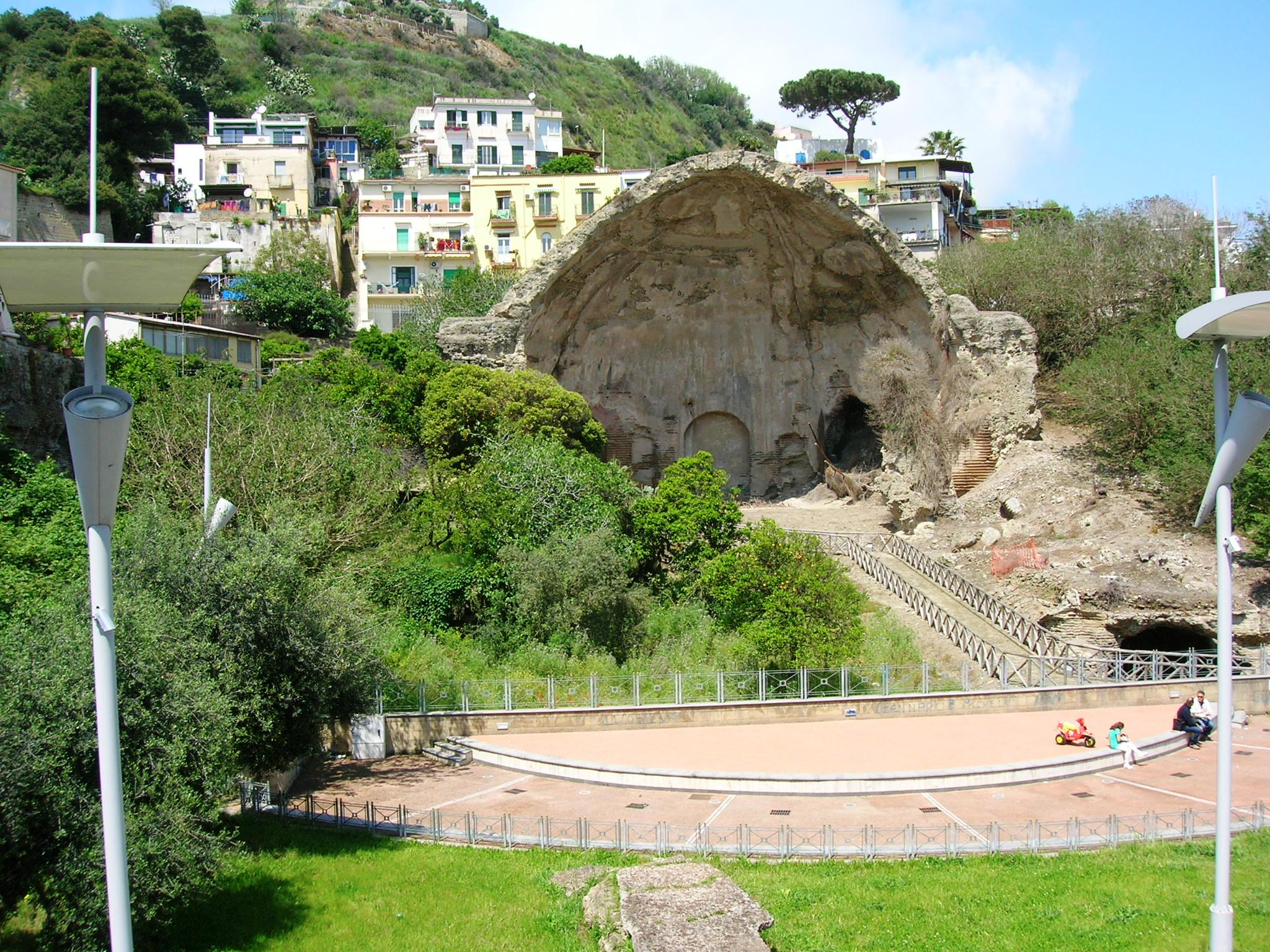 Il cosiddetto tempio di Diana a Baia